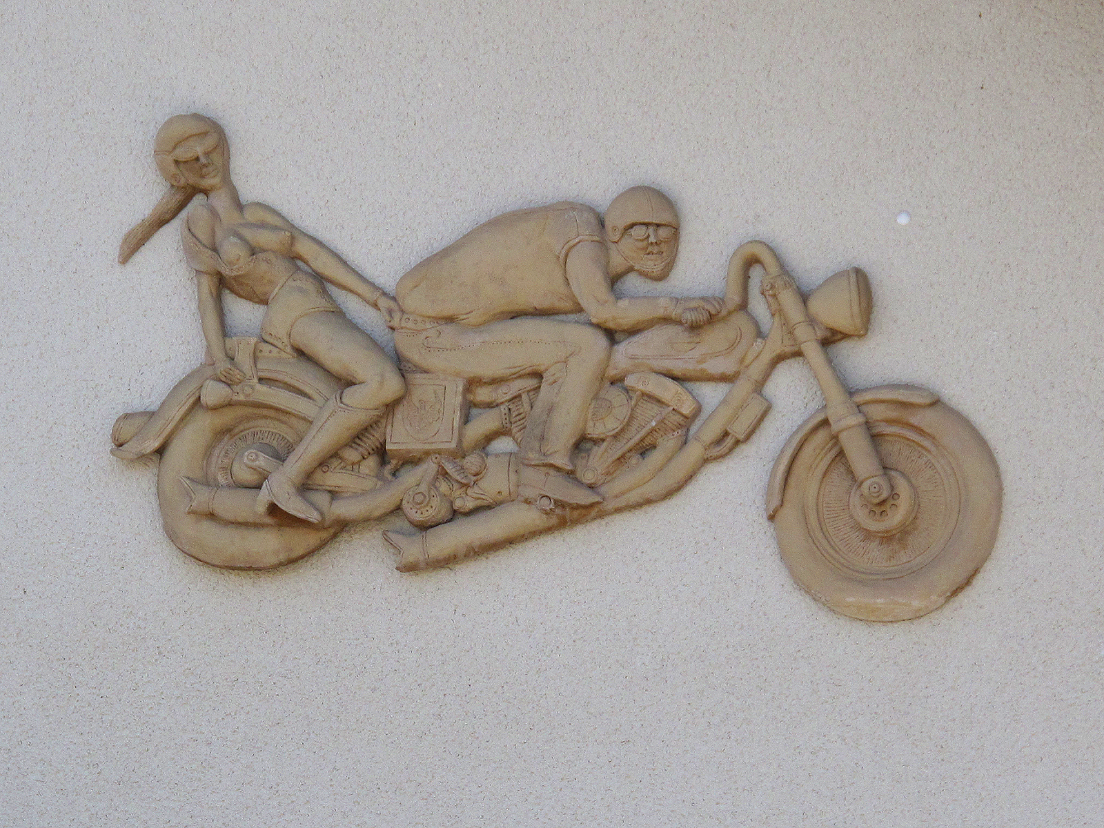 Peter Lenk, Motorradfahrer (Wandrelief), 1994, - Haus der Jugend, Schlossstraße 35